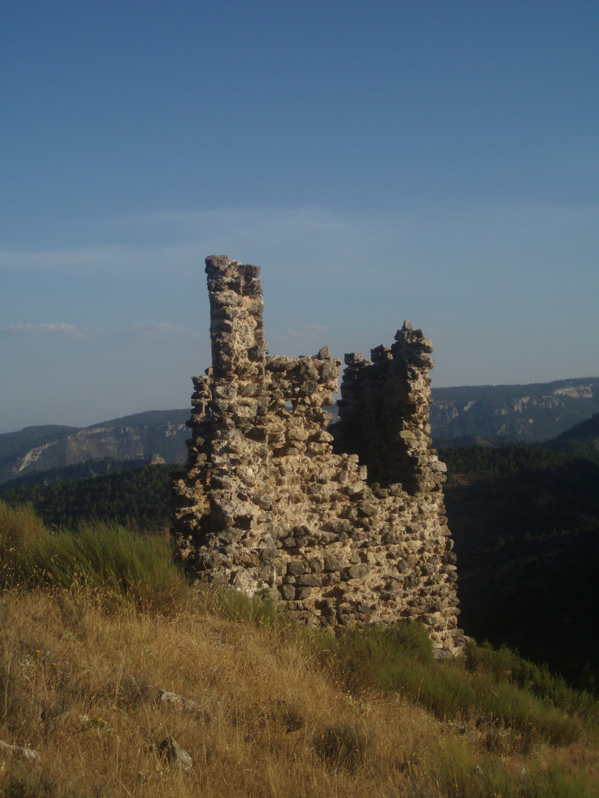 Fotografía del Castillo de La Vegallera (molinicos) provincia de Albacete